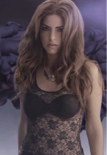 Actriz Isabel Burr en promoción de la serie Niñal Mal 2